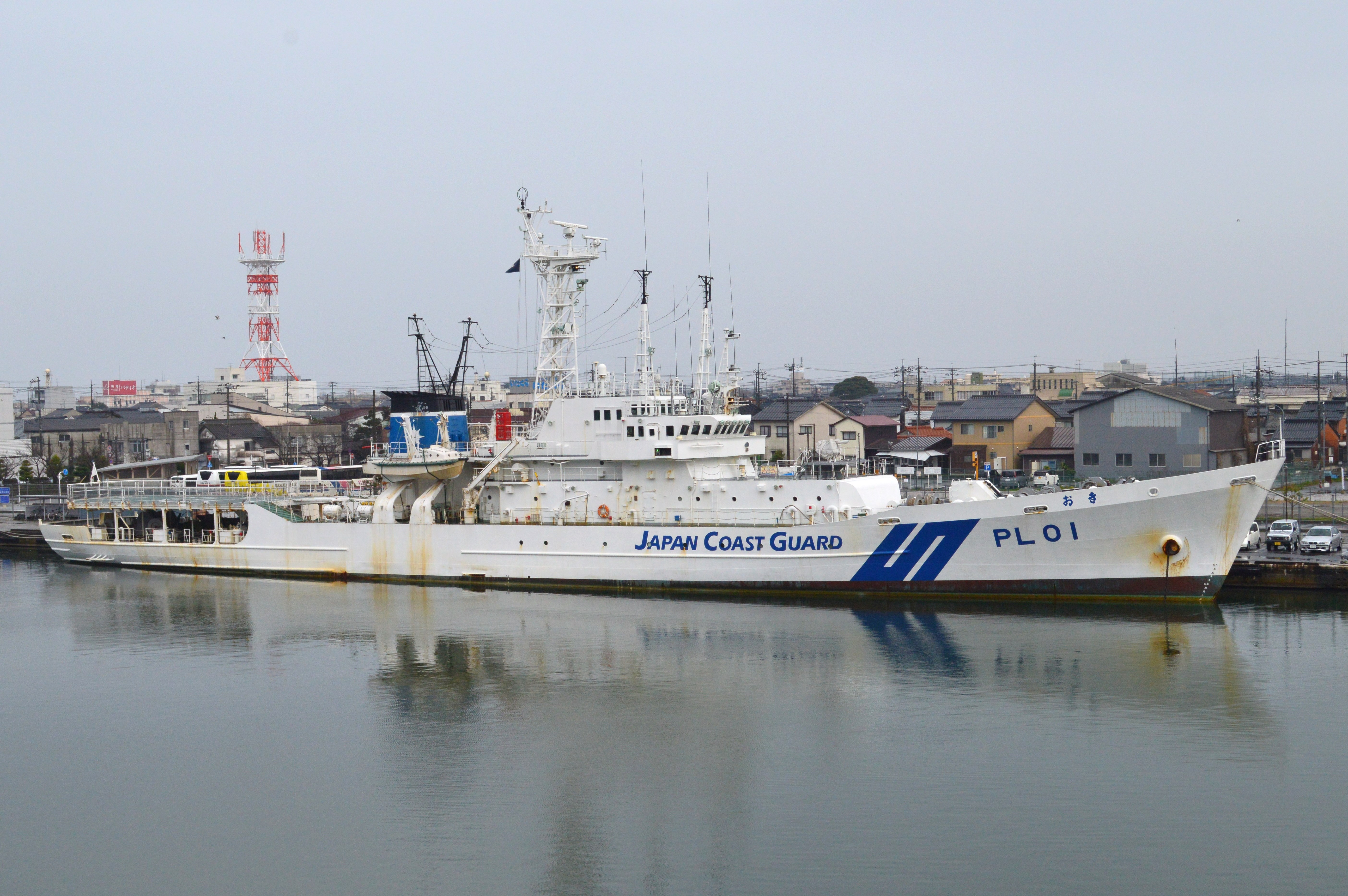 PL-01 おき (境港にて)